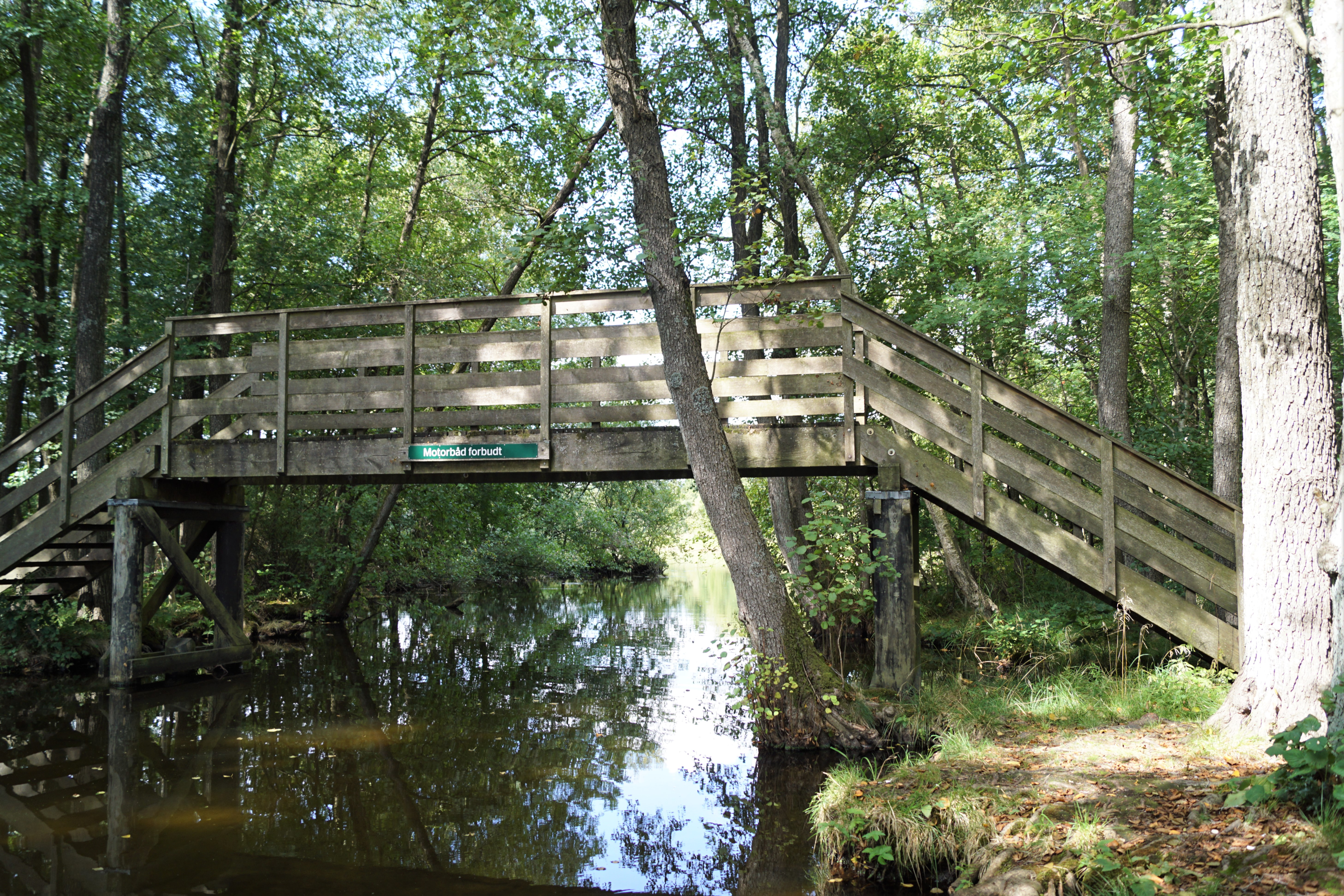 Skovridderens Bro ved udløbet af Vejlsø